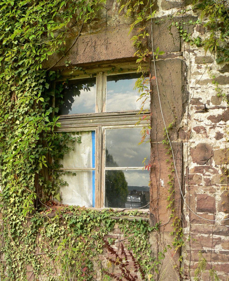 Alte Mühle in Fürstenberg, Fenstersturz mit Jahreszahl 1744